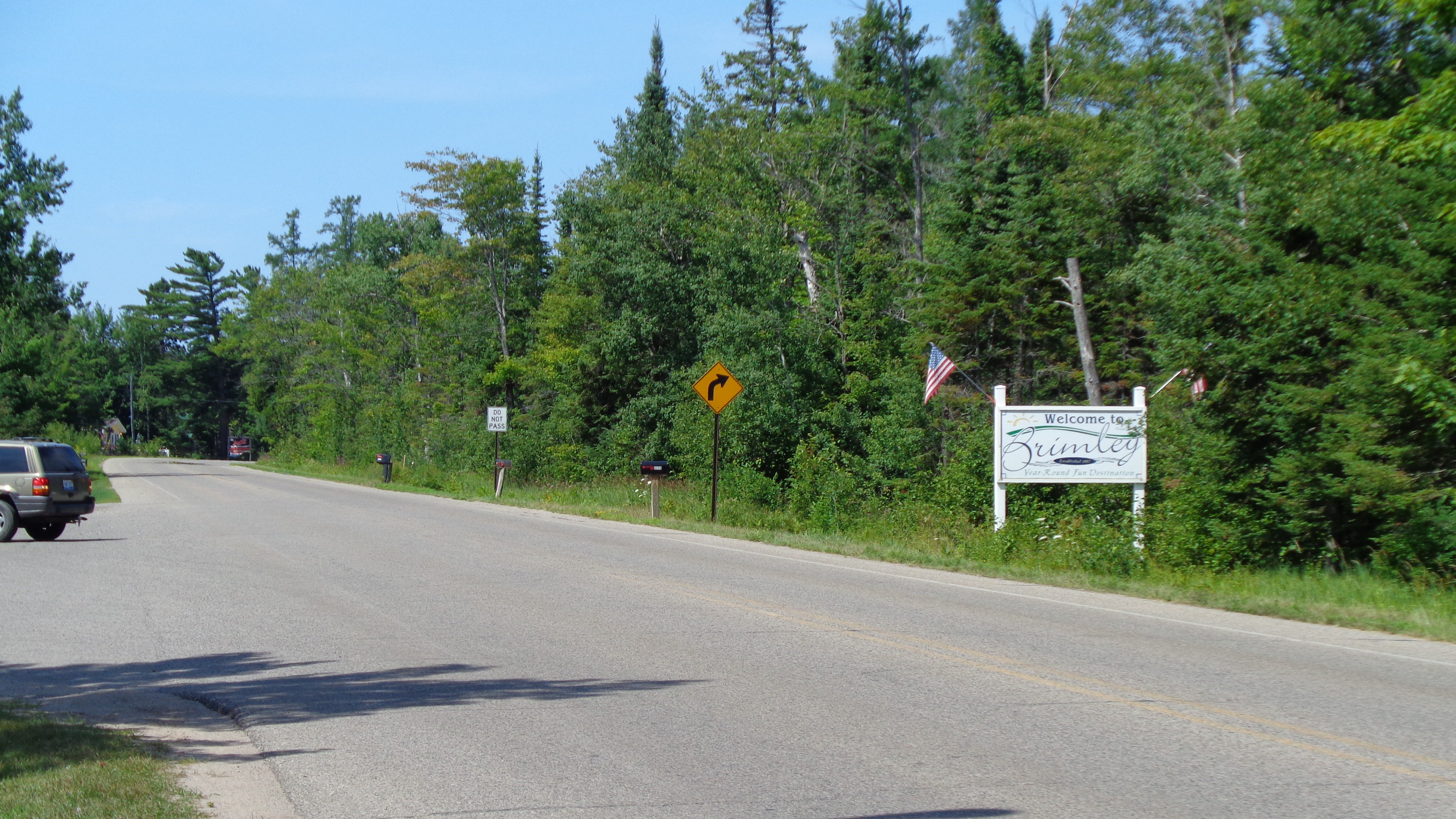 Brimley, MI